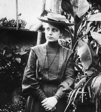 Lise Meitner around 1900